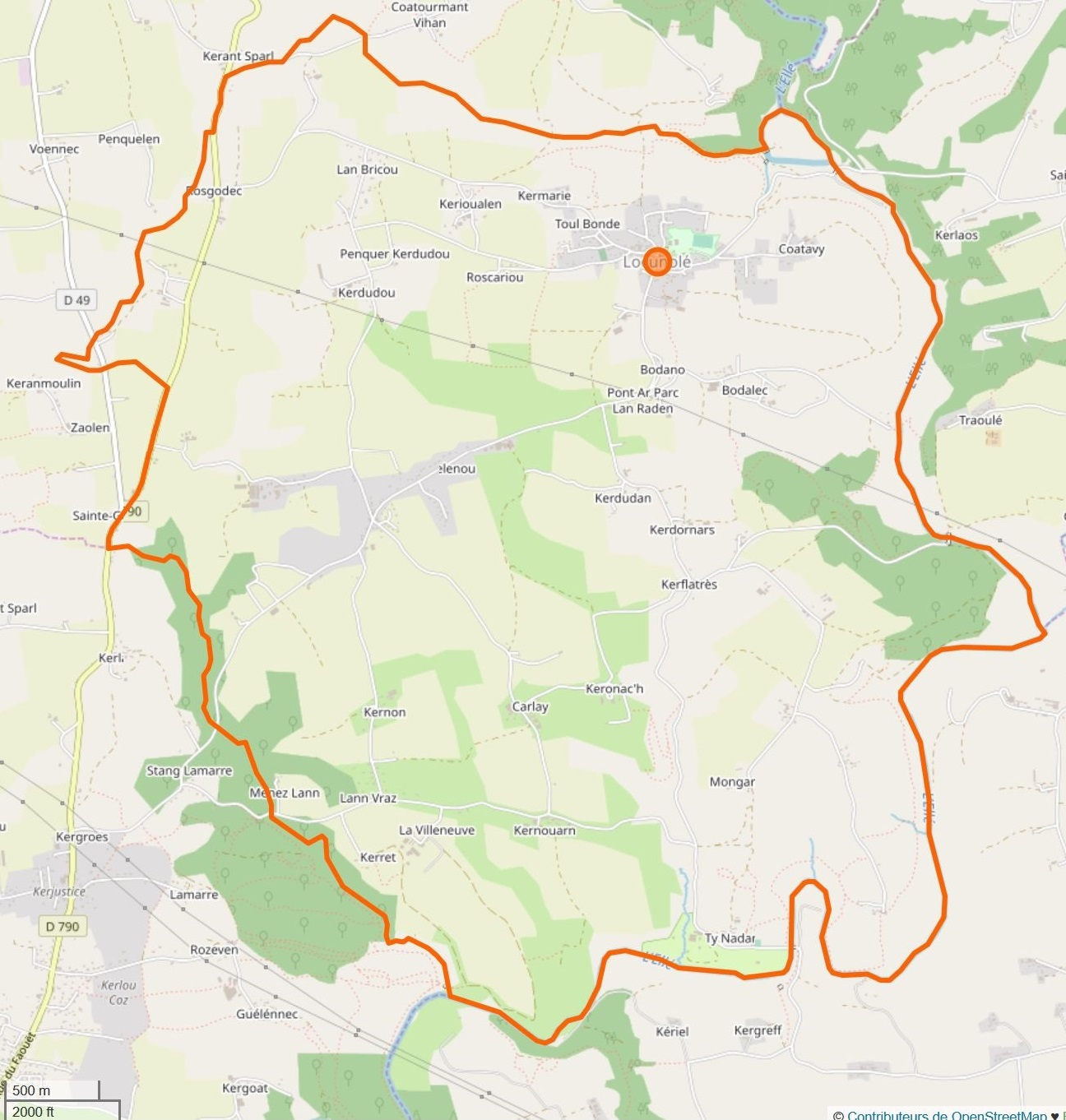 Cette carte a été créée à partir des données du projet Openstreetmap. This map may be incomplete, and may contain errors. Don't rely solely on it for navigation.